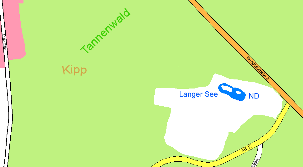 Der lange See bei Karlstein um das Jahr 2000 Grünfläche, Wiesen Siedlungsfläche Wald Gewässer Kreisstraße Bundesstraße